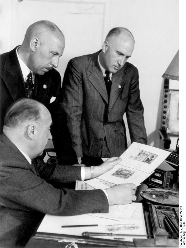 Zentralbild Sitzend: Reichswirtschaftsminister und Präsident der Deutschen Reichsbank Walter Funk, mit dem neuernannten Vizepräsidenten der Reichsbank Dr. Emil Puhl (links stehend) und Dr. Karl Lange bei der Betrachtung der Entwürfe zu den neuen vom Führer genehmigten Zwanzigmarkscheinen. 6936-40